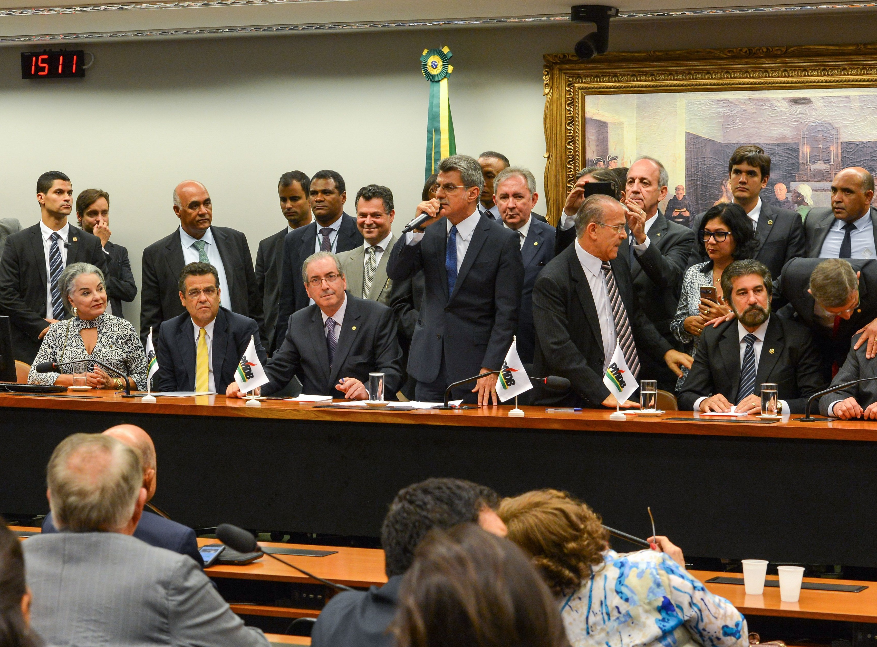 PMDB anuncia decisão de sair do governo Dilma Rousseff.